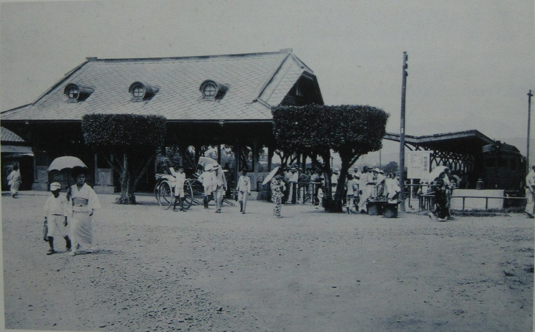 新北投驛，之後的臺鐵新北投車站，現拆遷至彰化臺灣民俗村